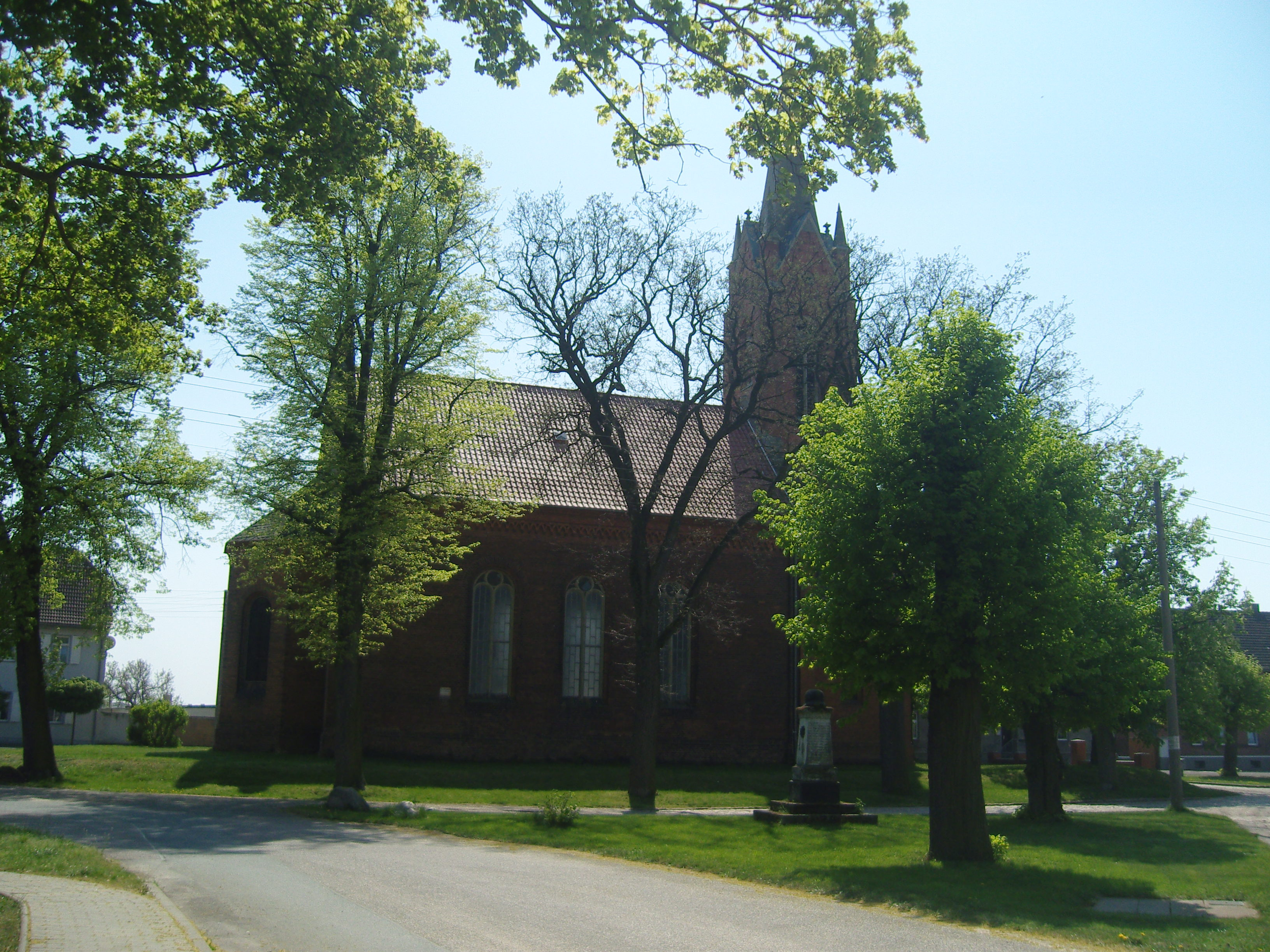 Kirche in Hinsdorf